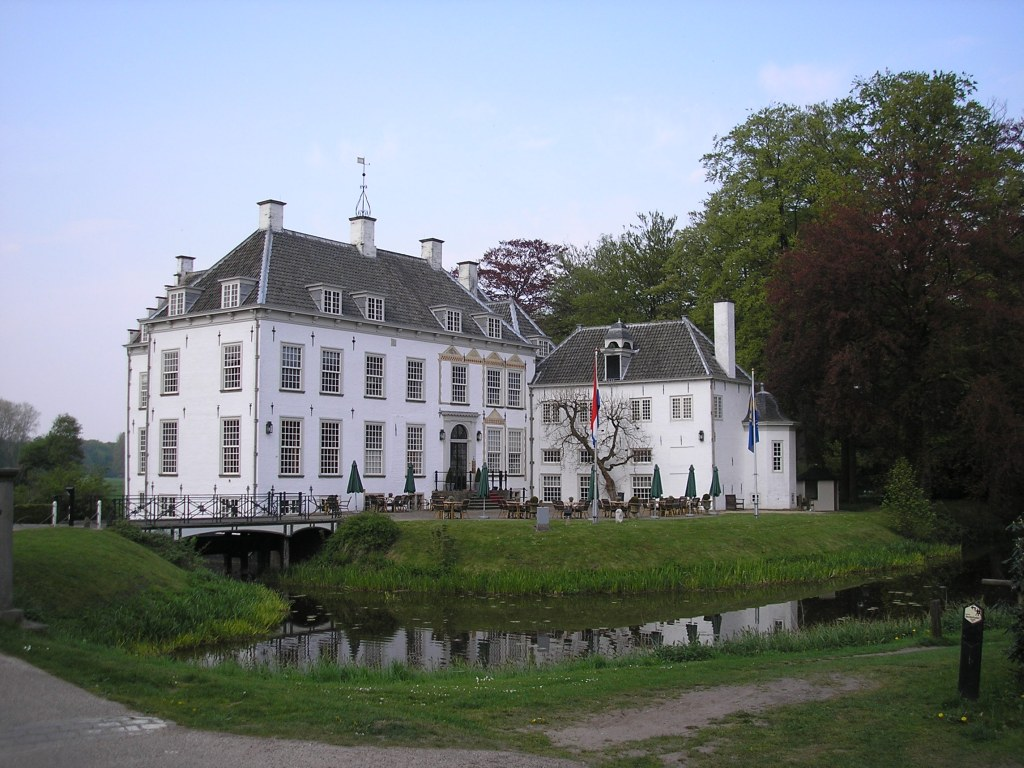 Huis 't Velde, Warnsveld, NL - Voorkant, net buiten de poort Foto: Pudding4brains, 5 mei 2006 - Publiek Domein